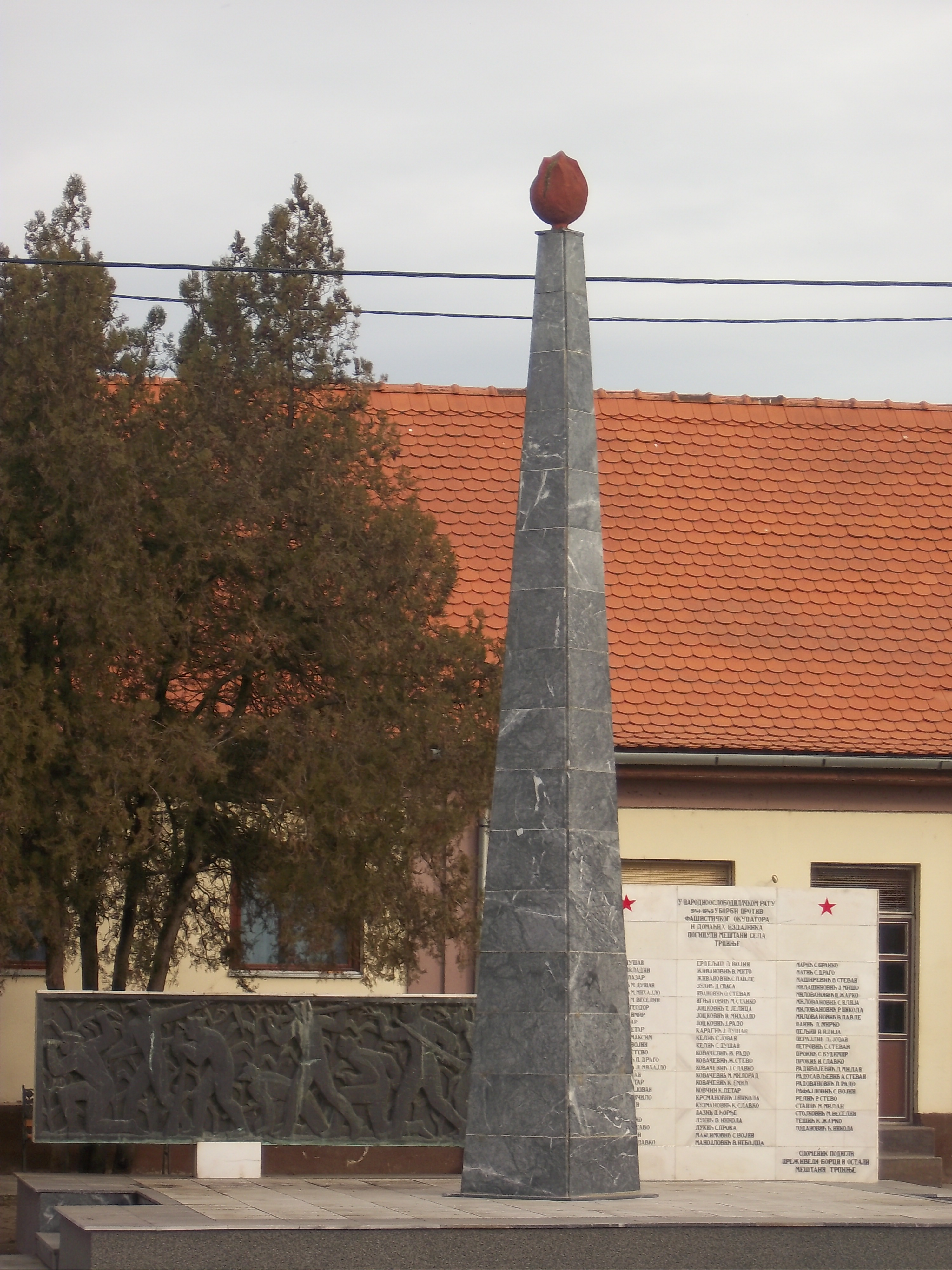 Spomenik borcima NOB-a u Trpinji.